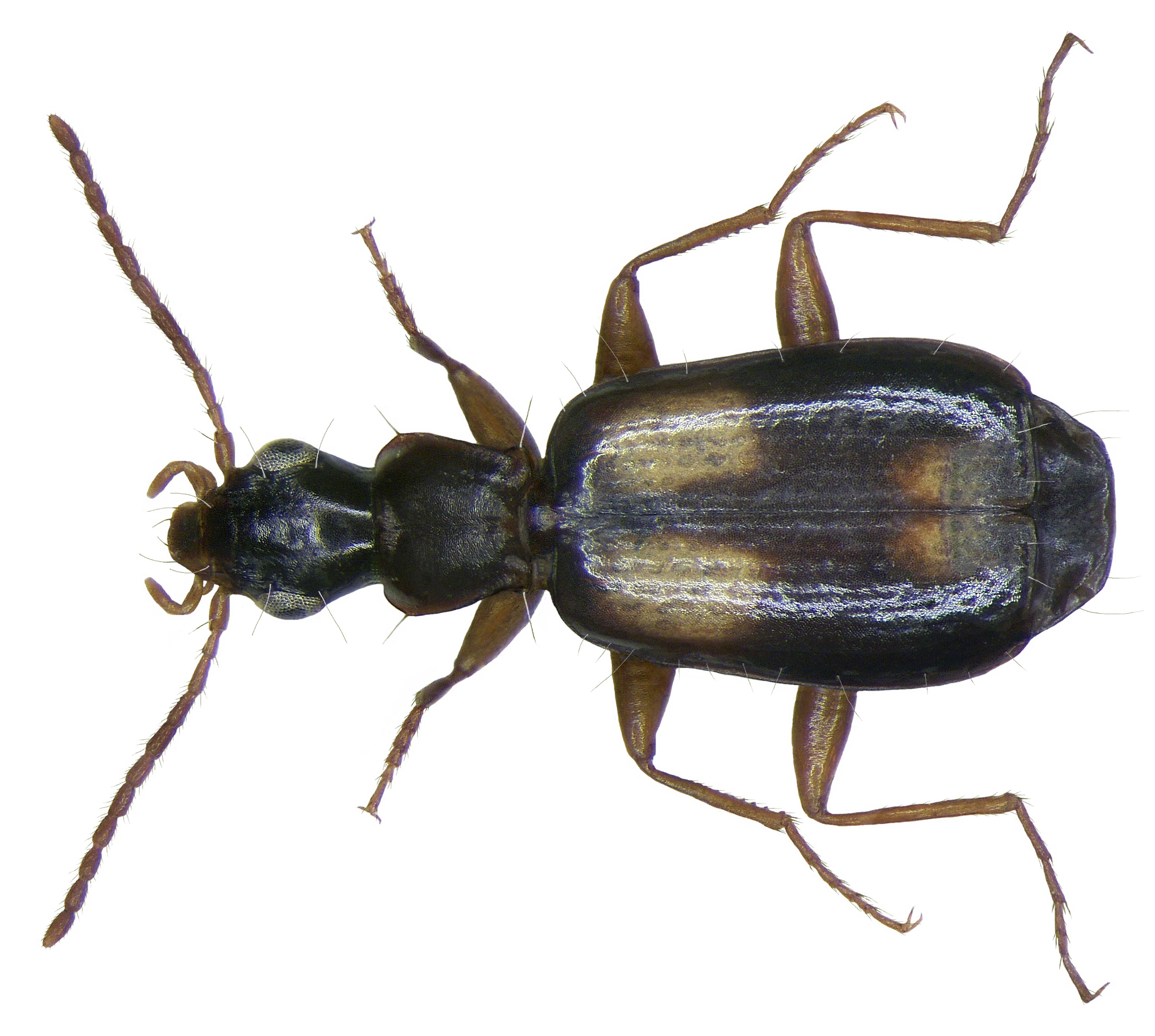 Familie: Carabidae Grösse: 3,5-4,0 mm Verbreitung: fast ganz Europa, Kleinasien, Nordafrika Ökologie: tagsüber unter Baumrinde, nachtaktiv Fundort: Germania, Oberbayern, Ascholding leg.det. U.Schmidt, 1975 Foto: U.Schmidt, 2008